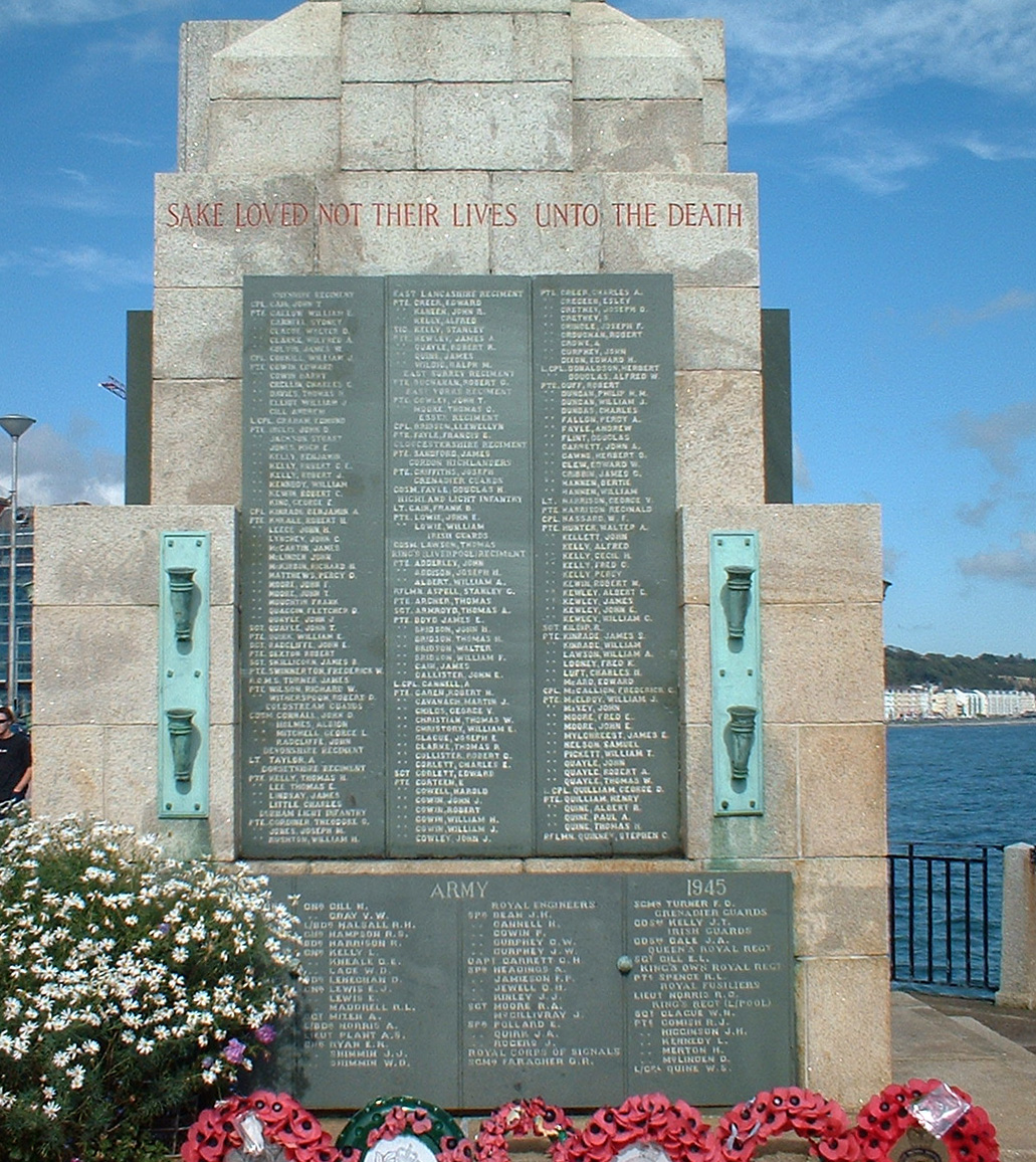 Øya Man, hovedstaden Douglas, krigsminnemerke - nærbilde av de falne Isle of Man, main city Douglas, War Memorial, close-up